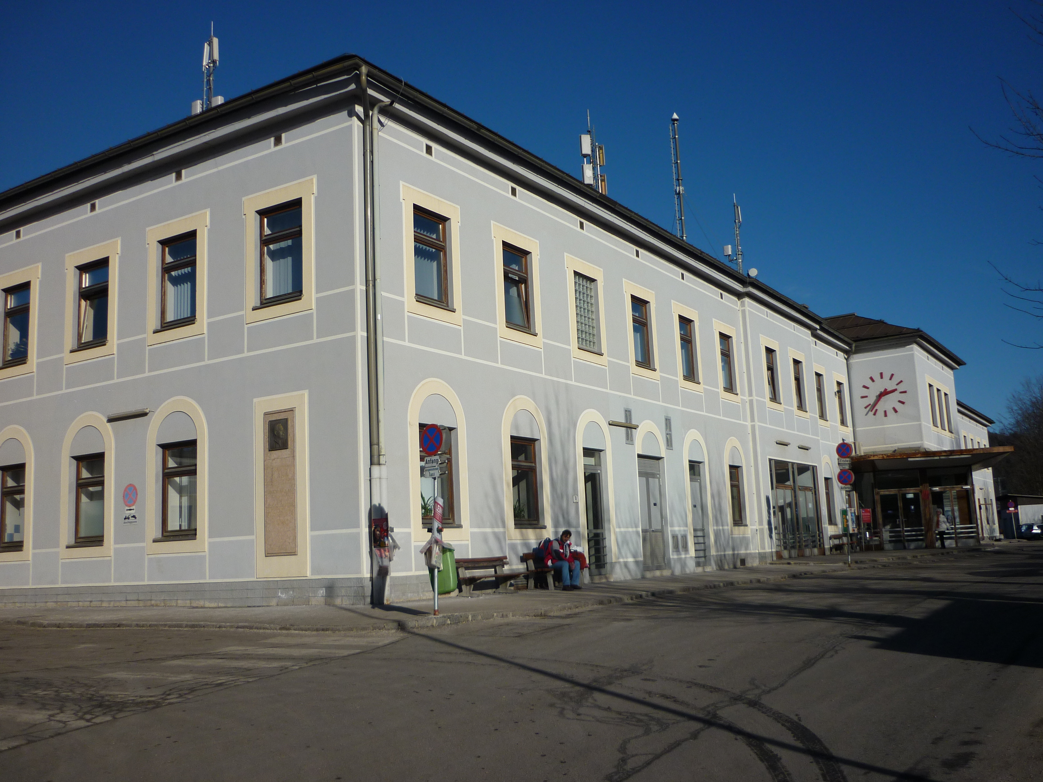 Bahnhofsgebäude Mürzzuschlag